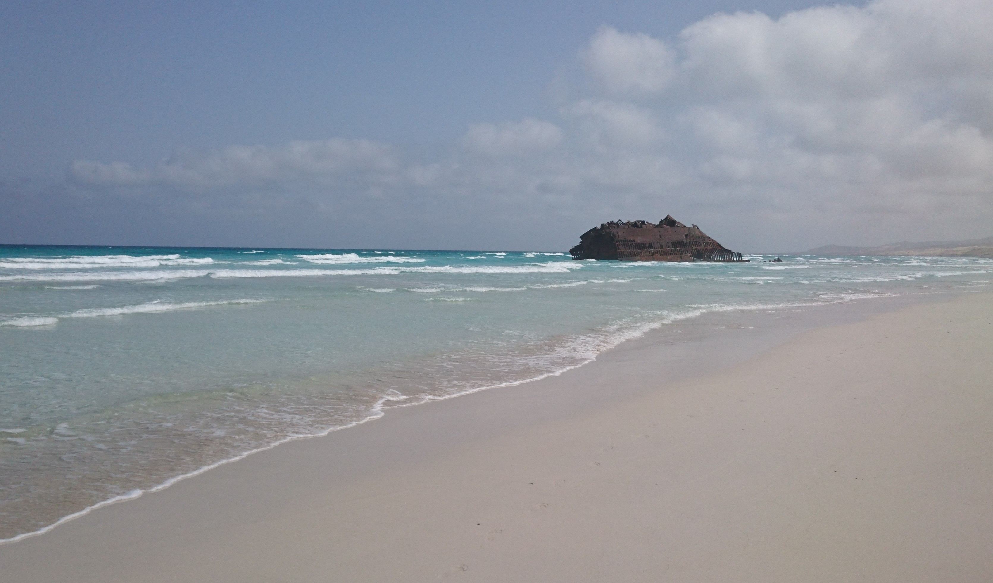 Das Wrack eines aufgelaufenen Lebensmittelfrachters am Strand von Cabo Santa Maria auf der Insel Boa Vista.